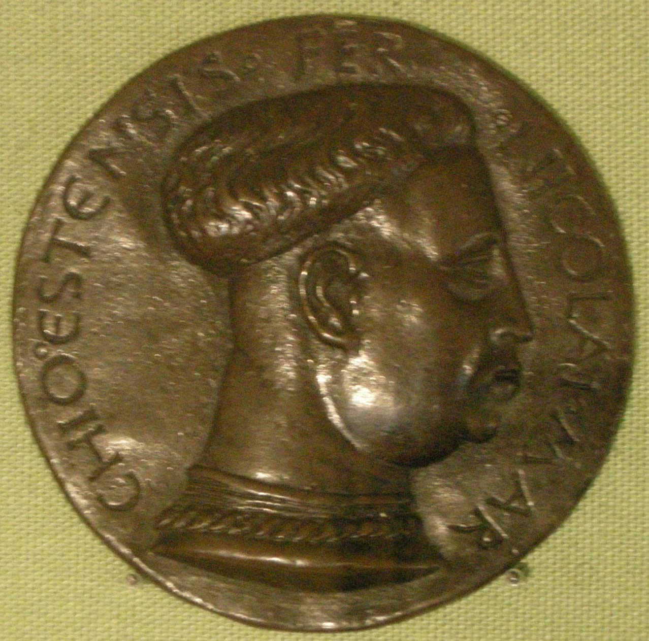 Niccolò III d'Este, 1439-41 ca